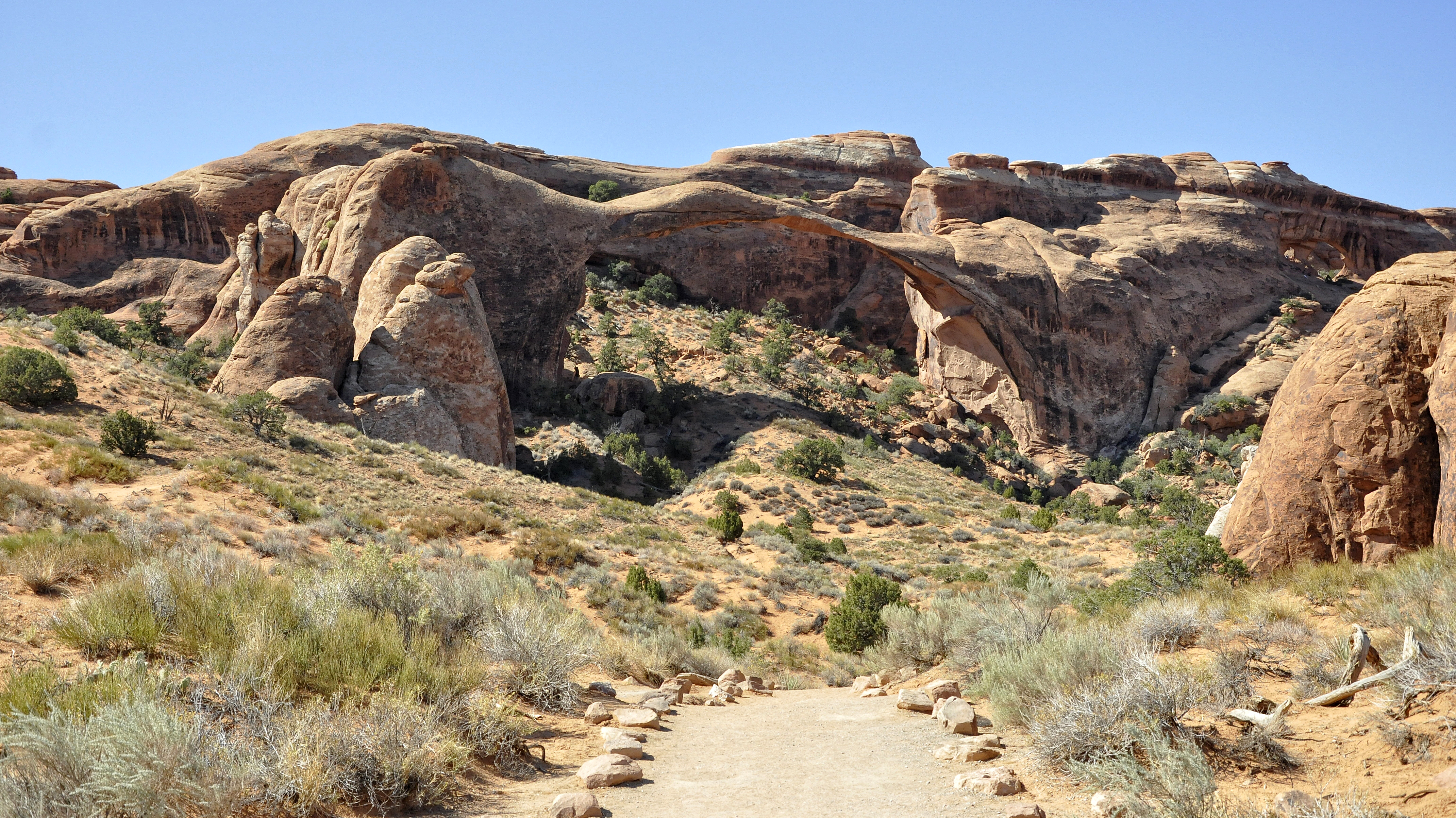 Landscape Arch, Arches NP in Moab, Utah